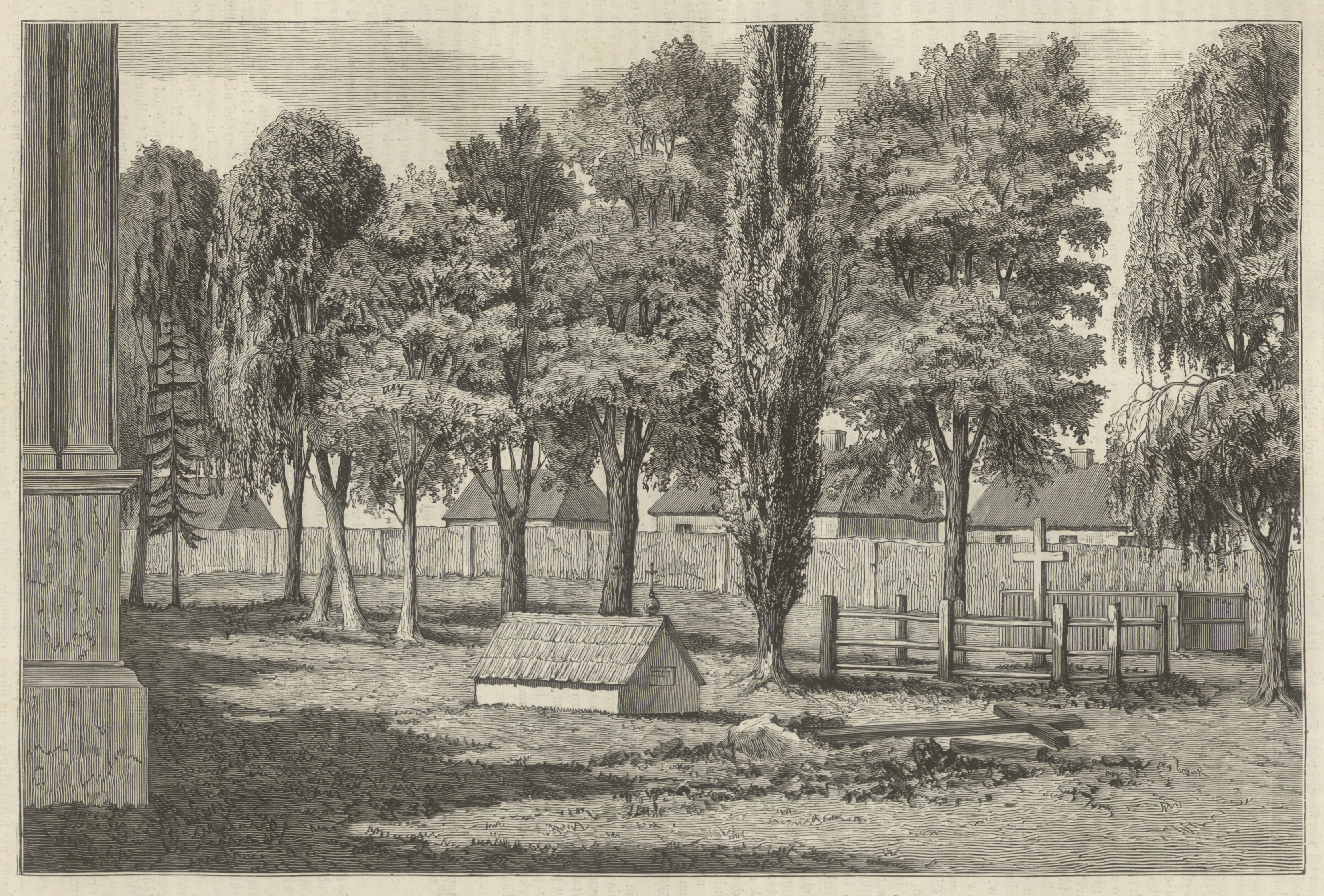 Беларуская (тарашкевіца): Лыскаў (Łyskaŭ), надмагільле Францішка Карпінскага (Francišak Karpinski)